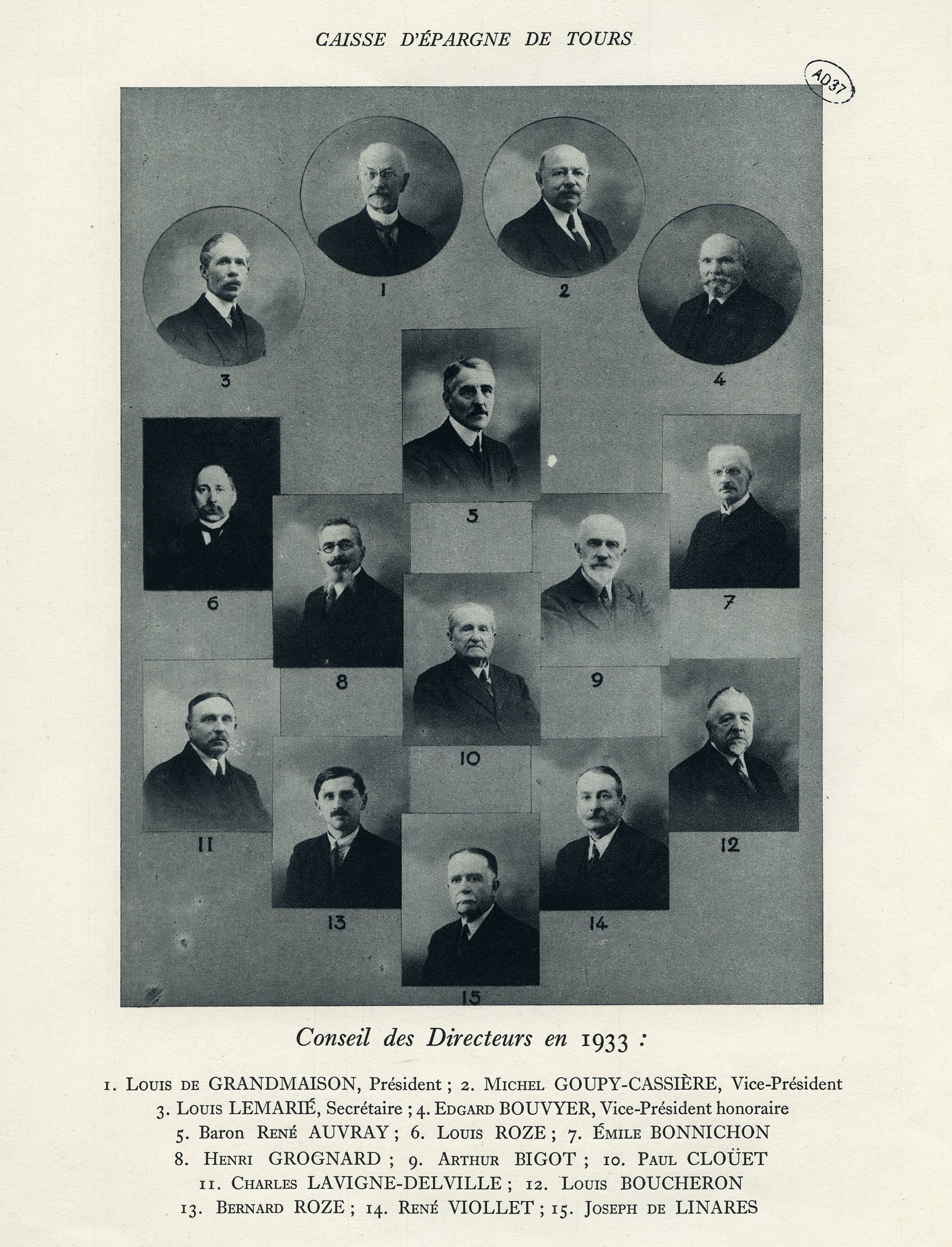 CAISSE D'EPARGNE DE TOURS - Conseil des Directeurs en 1933 : 1. Louis de Grandmaison (président) ; 2. Michel Goupy-Cassière (vice-président) ; 3. Louis Lemarié (secrétaire) ; 4. Edgard Bouvyer (vice-président honoraire) ; 5. baron René Auvray ; 6. Louis Roze ; 7. Émile Bonnichon ; 8. Henri Grognard ; 9. Arthur Bigot ; 10. Paul Cloüet ; 11. Charles Lavigne-Delville ; 12. Louis Boucheron ; 13. Bernard Roze ; 14. René Viollet ; 15. Joseph de Linares